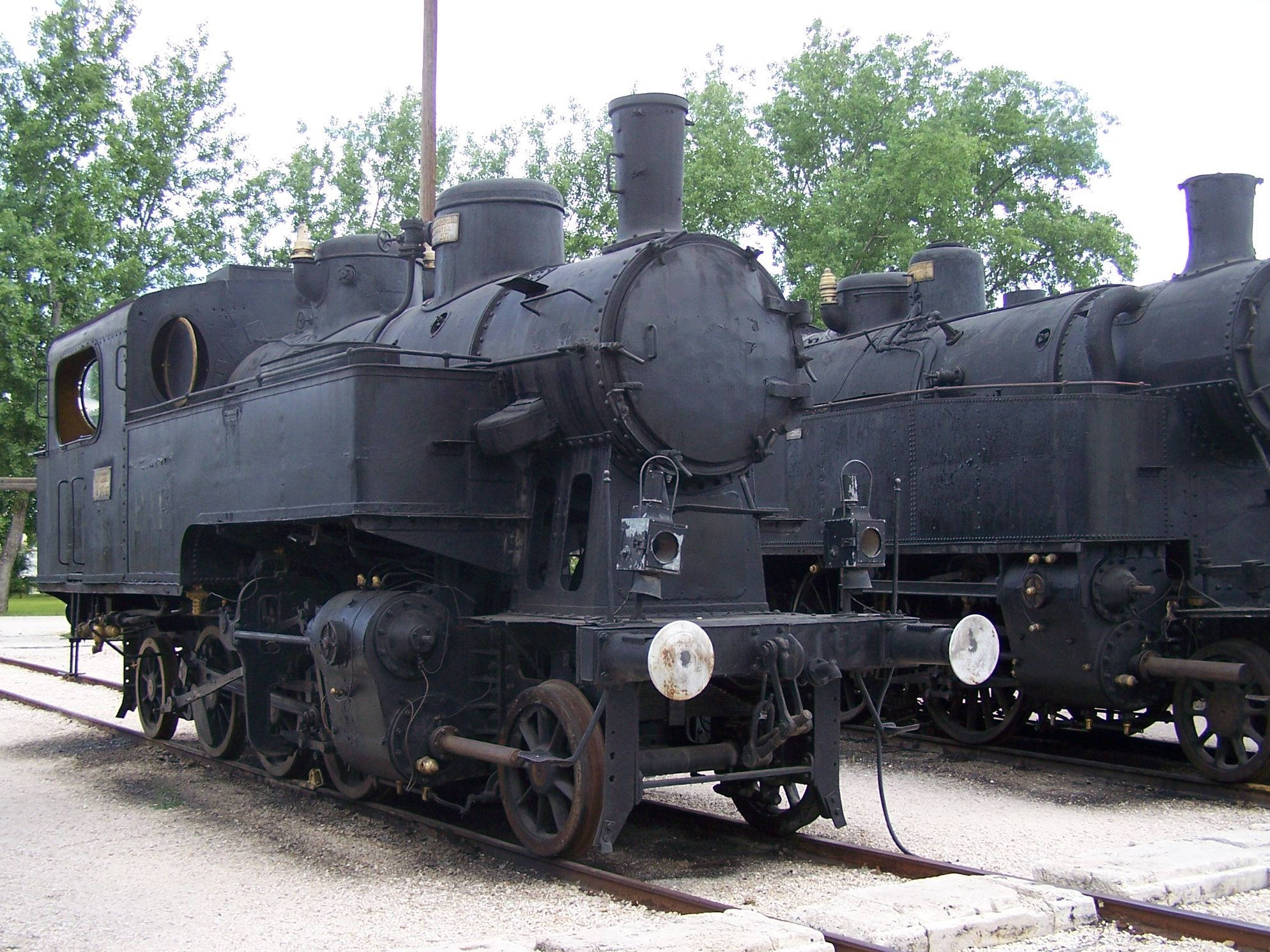 MÁV 376 a Füsti vasúttörténeti parkban